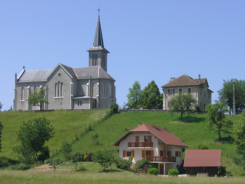 L'Eglise de Chavanod en Haute-savoie